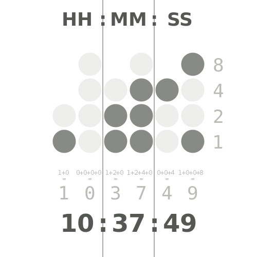 سازوکار برخی ساعت های ال ای دی که با سیستم تبدیل دهدهی به رمز دودویی کار می کنند